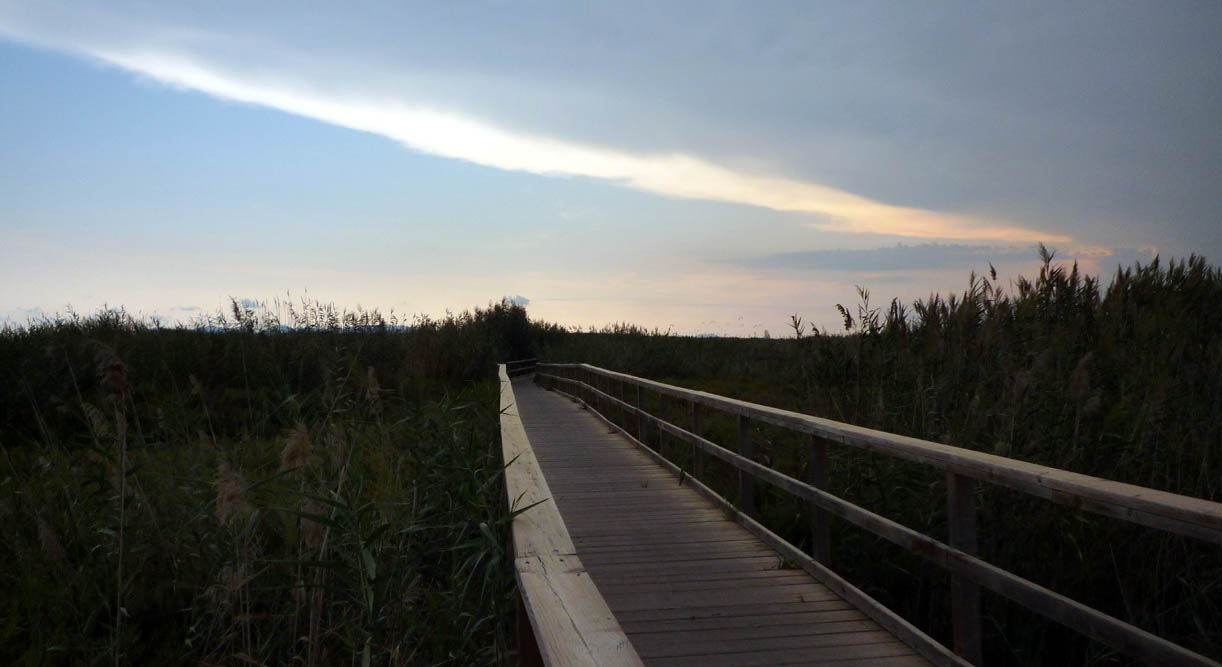 Playa de La Hita en Los Alcázares (Región de Murcia). Espacio protegido dentro del parque natural de "Islas y espacios abiertos del Mar Menor".